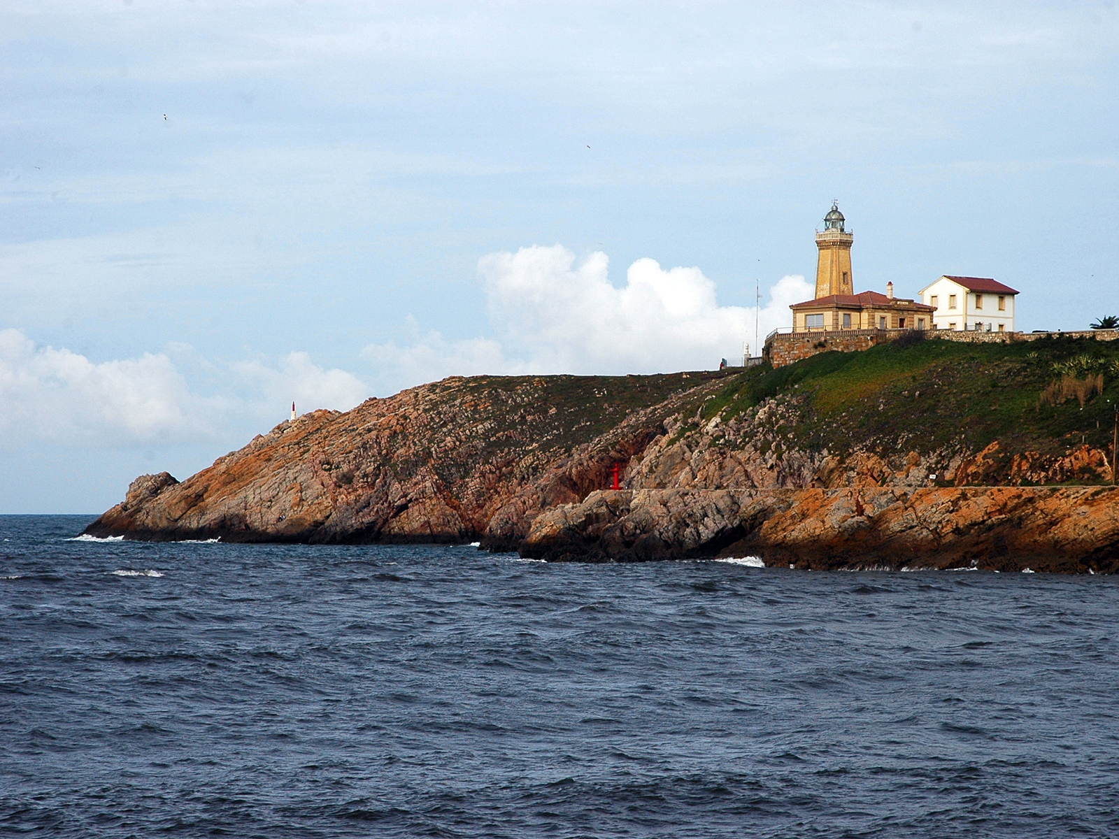 Faro de Avilés Autor: Ramón Noriega